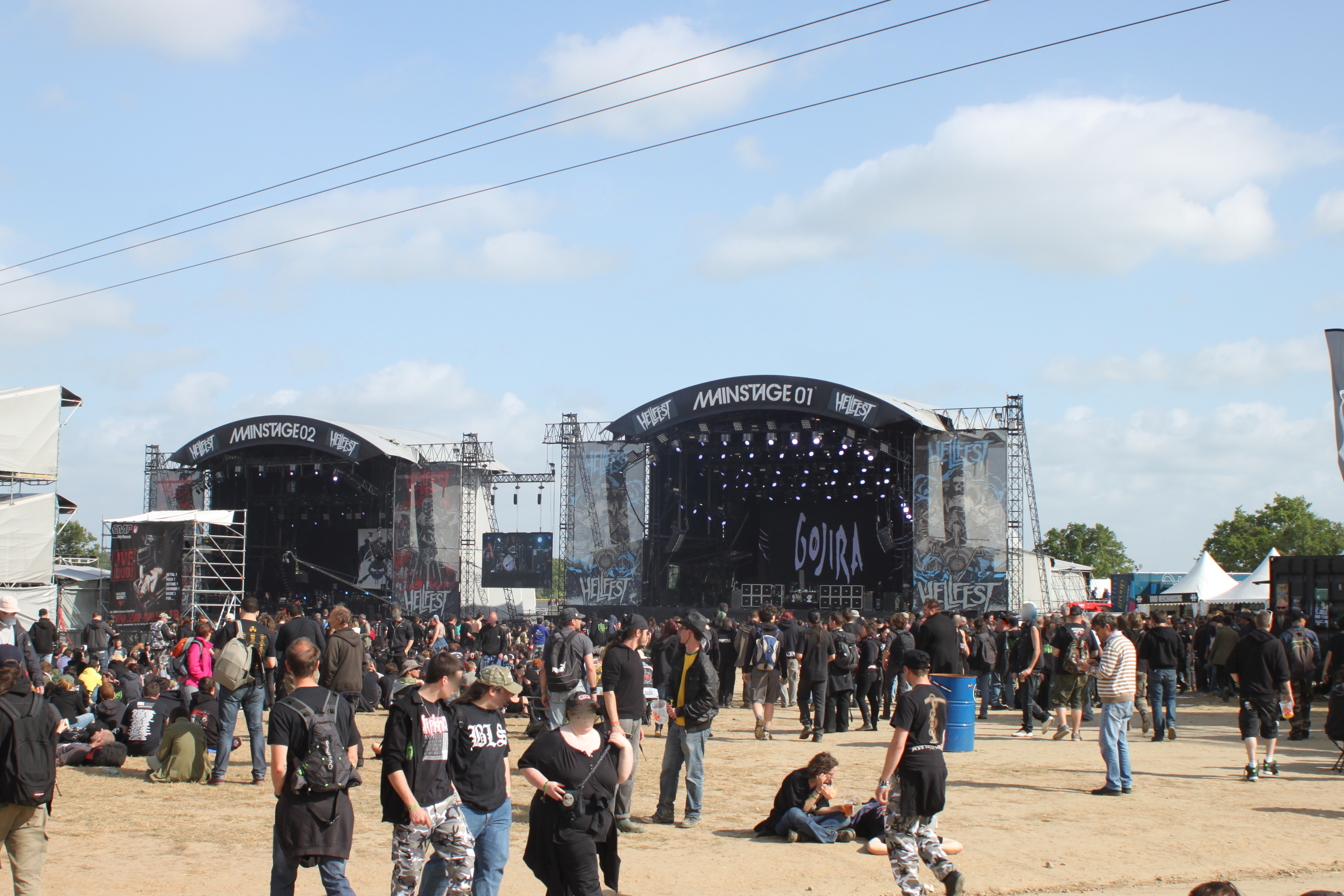 Mainstages, Hellfest 2013, Fr-44Clisson.